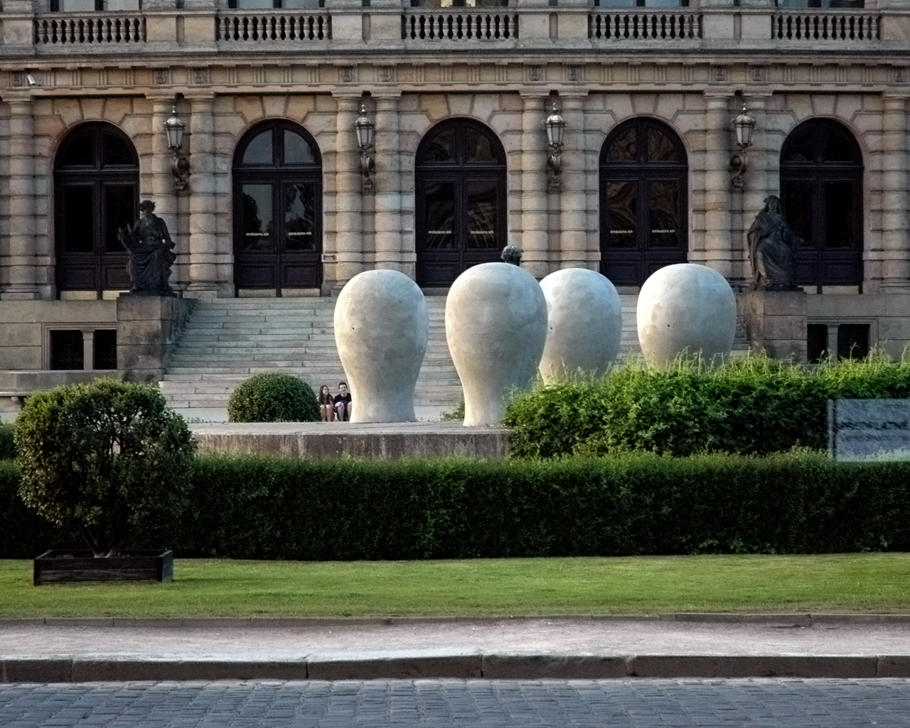 Kurt Gebauer, Hlavičky, náměstí Jana Plalacha, Praha, 2011